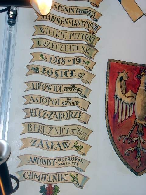 Sufit w sali 2 pułku ułanów grochowskich Instytutu im. Sikorskiego w Londynie